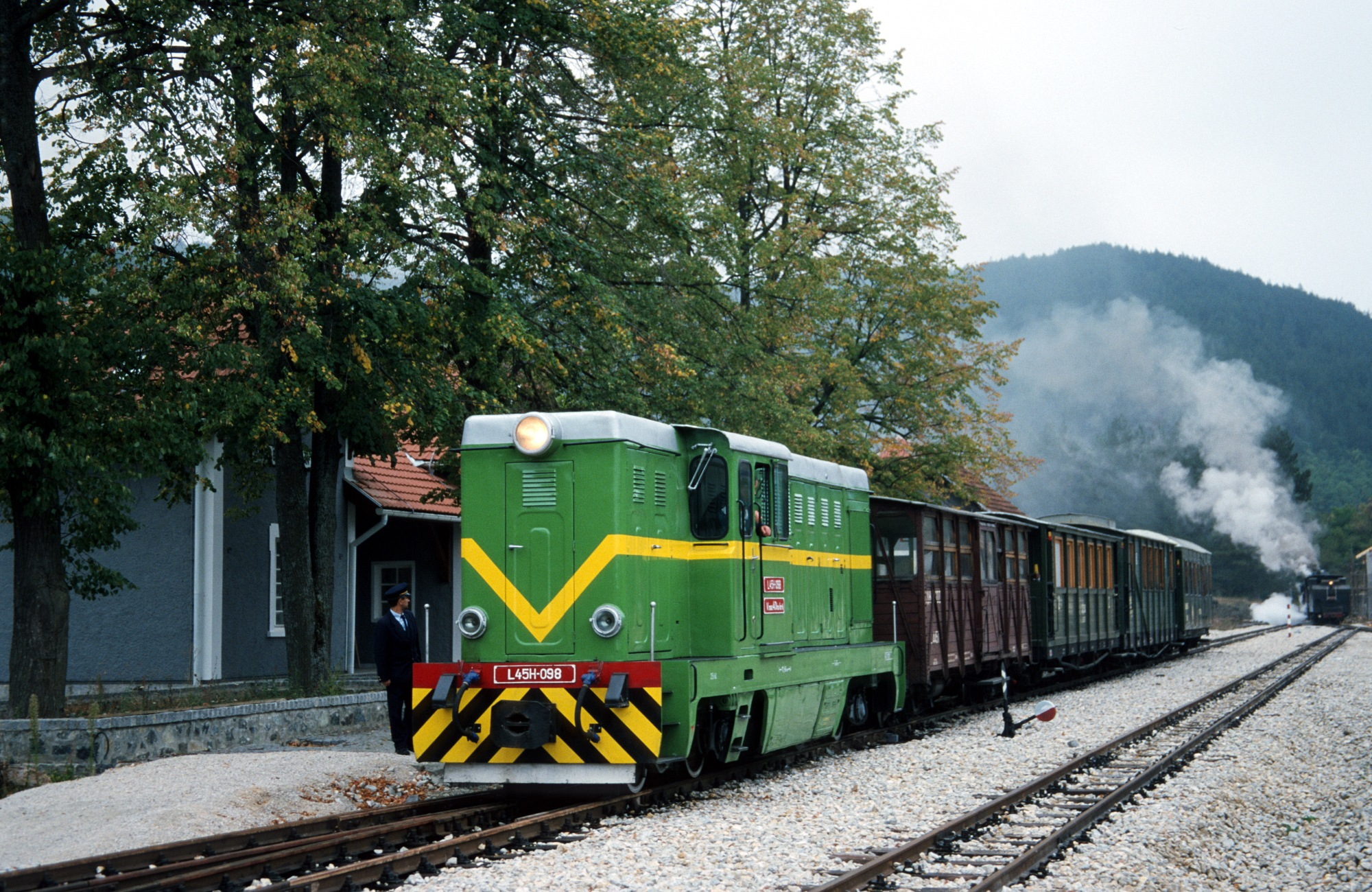 en: Passenger train with Romanian built diesel engine L45H-098 in Šargan Vitasi station, on the Šarganska osmica heritage railway in Serbia. de: Personenzug mit einer in Rumänien gebauten Diesellok L45H-098 im Bahnhof Šargan Vitasi der Museumsbahn Šarganska osmica in Serbien.